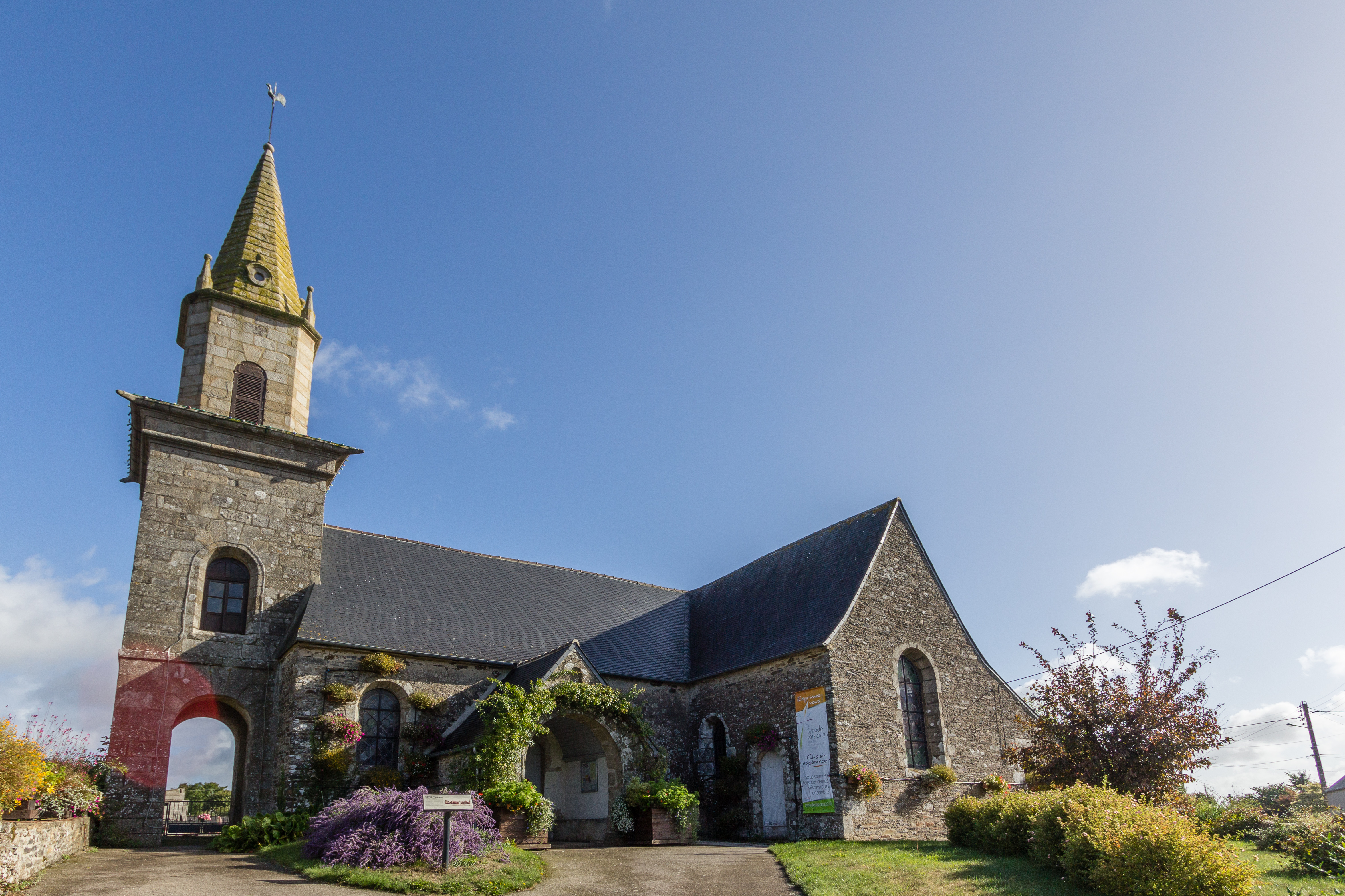 Extérieur de l'église Saint Théo, Le Bodéo (France).